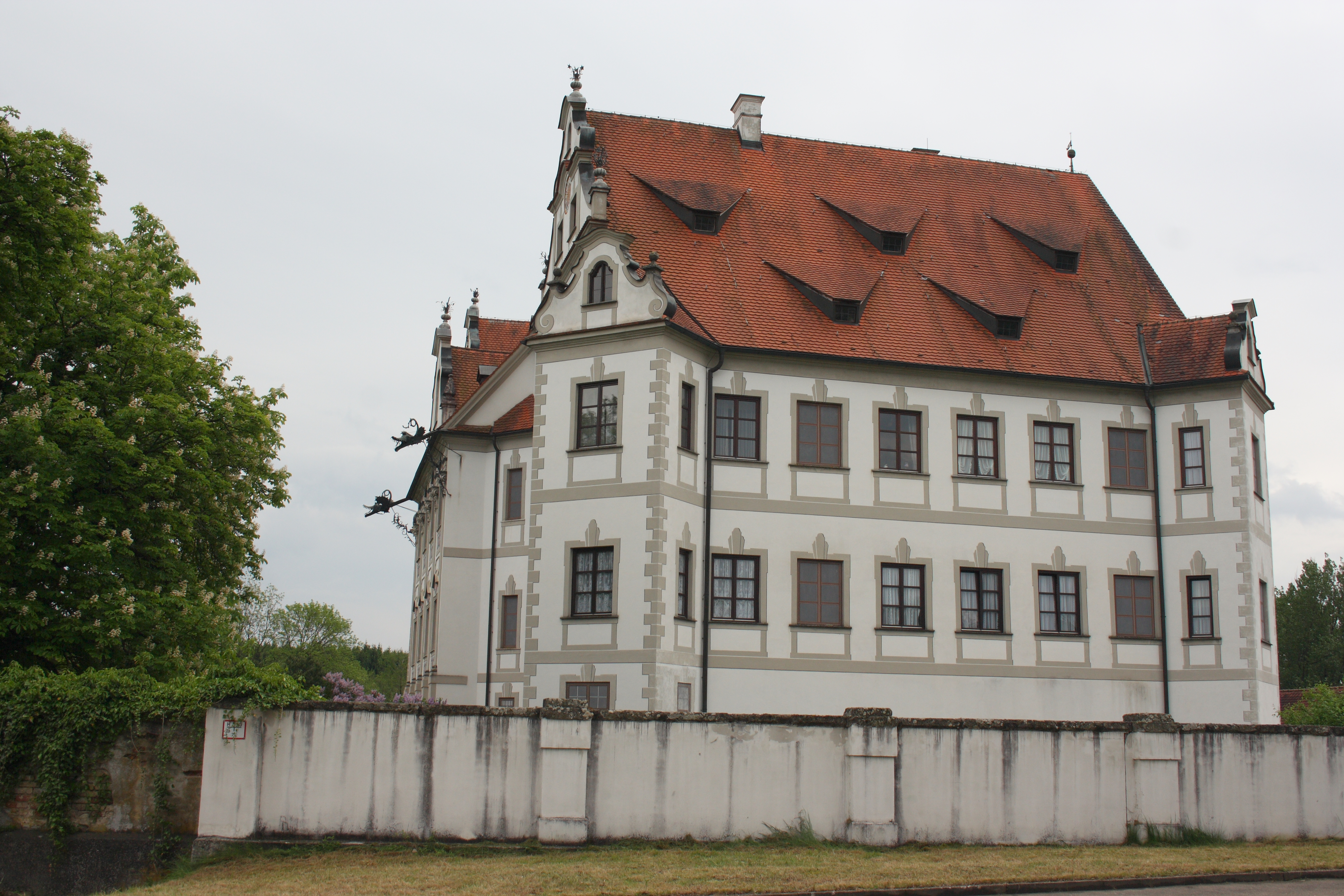 Schloss in Harthausen, einem Ortsteil von Rettenbach im Landkreis Günzburg (Bayern)